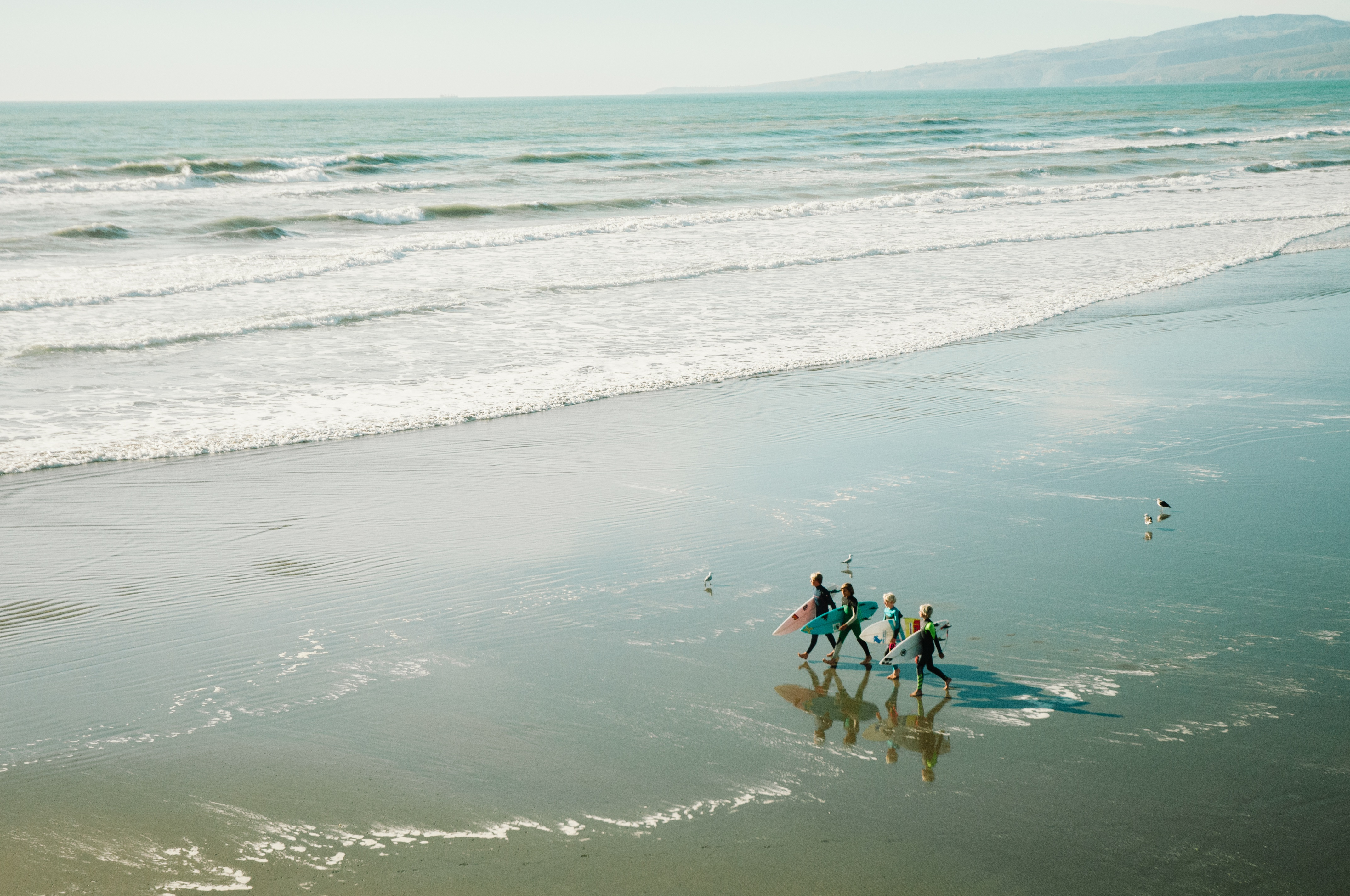 Praia em New Brighton, Nova Zelândia.